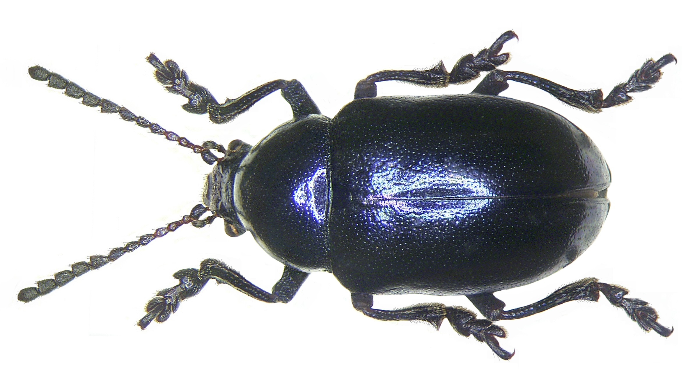 Eumolpus asclepiadeus Pallas, 1776 Familie: Chrysomelidae Grösse: 8-10 mm Verbreitung: Südeuropa bis Mitteleuropa Ökologie: an Vincetoxium officinale Fundort: Austria, Hainburg leg. det. G.Rößler, 1983 Foto: U.Schmidt, 2007